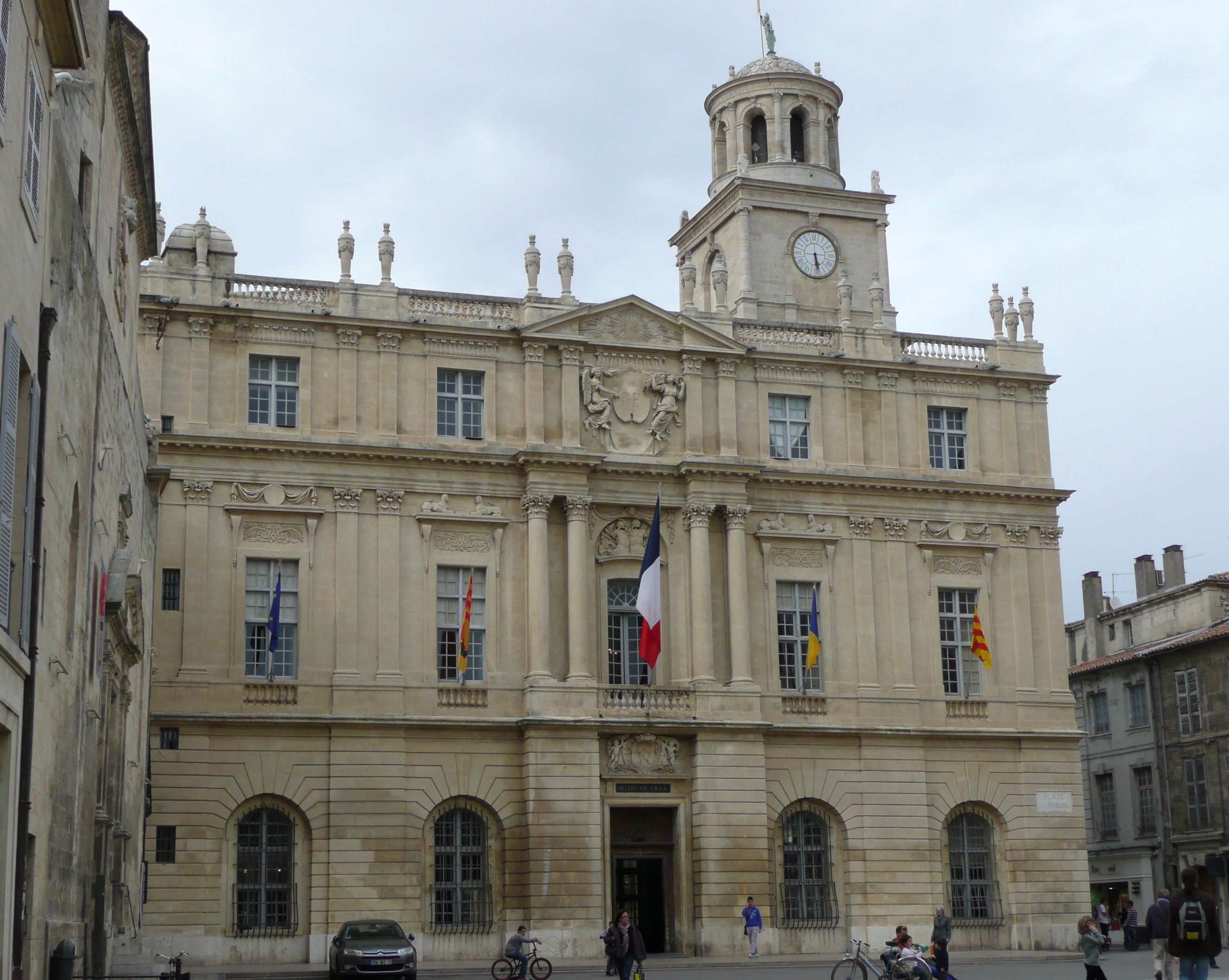 Hôtel-de-Ville d'Arles (13), place de la République, terminé en 1676, d'après les plans de l'arlésien Jacques Peytret et du parisien Jules Hardouin-Mansart.